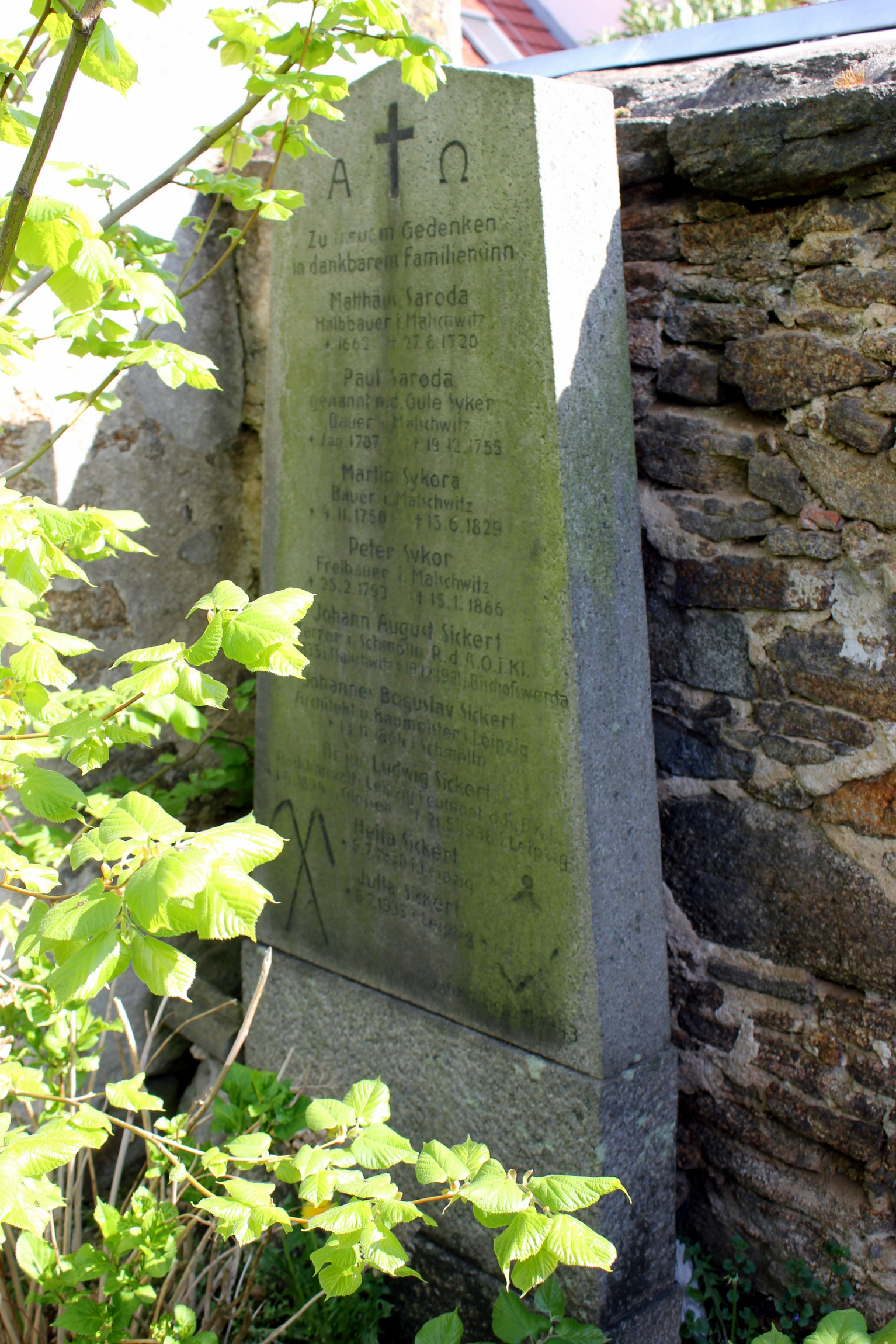 Hornjoserbsce: Malešecy; narowny kamjeń Sykorec swójby.